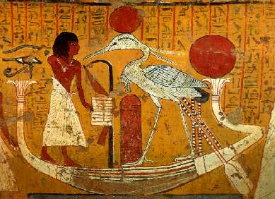 Dibujo en papiro de Bennu.